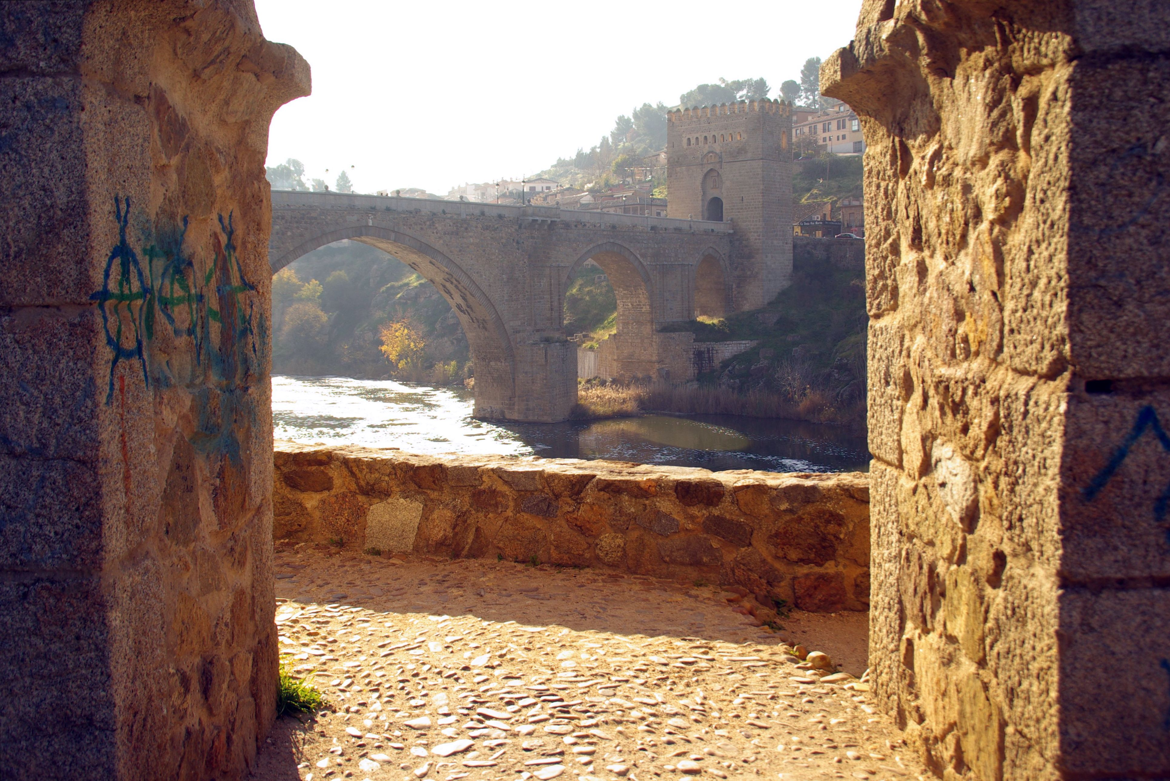 ® S.D. TOLEDO RONDA DE MURALLA_PUERTA ◙